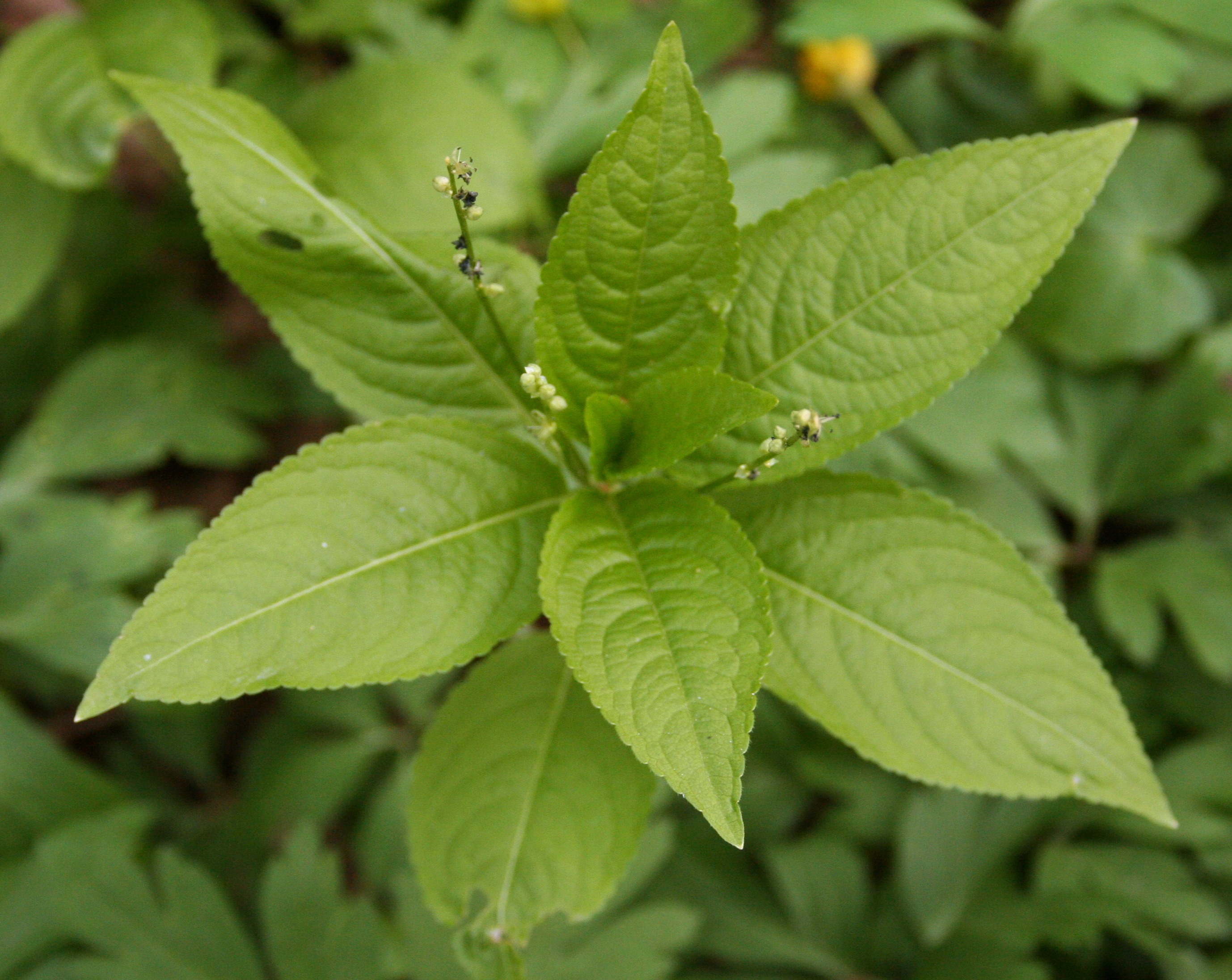 Mercurialis perennis - szczyr trwały